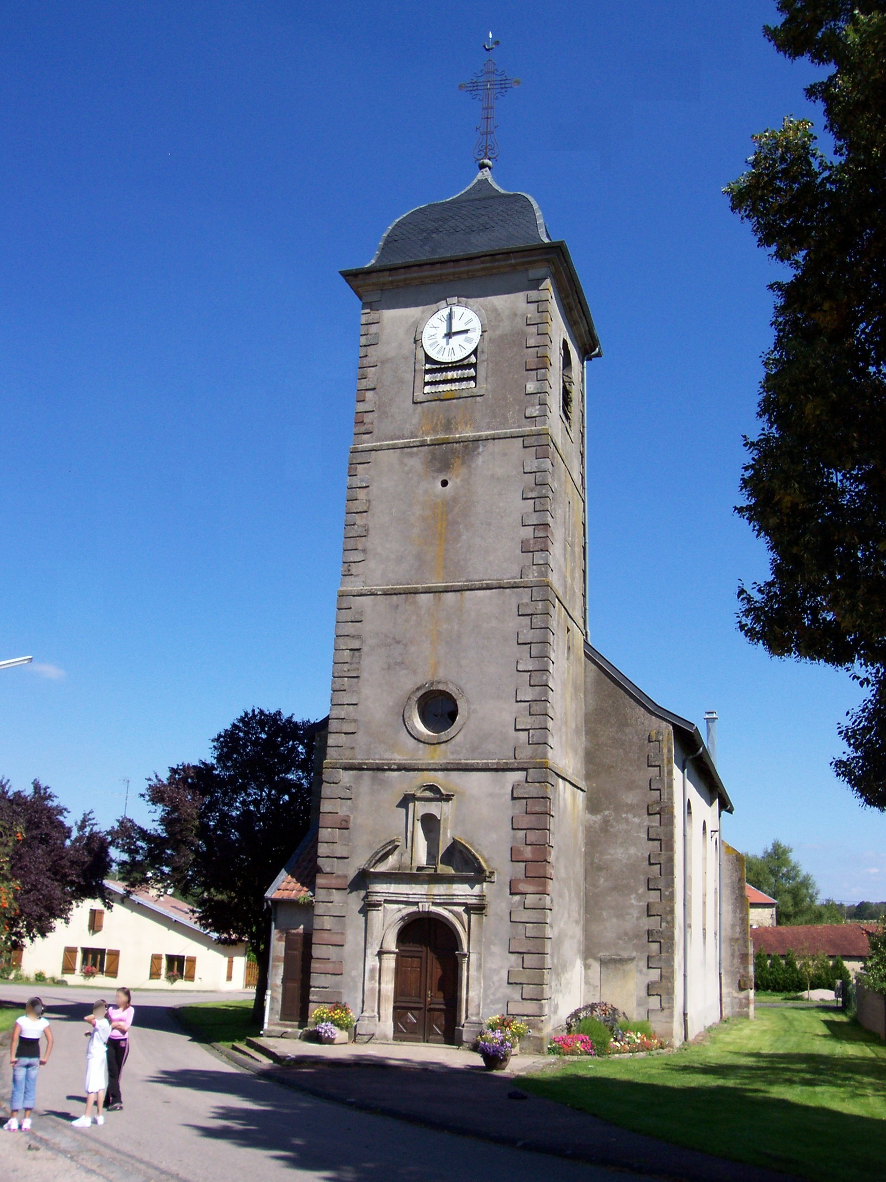 Eglise d'Ogéviller